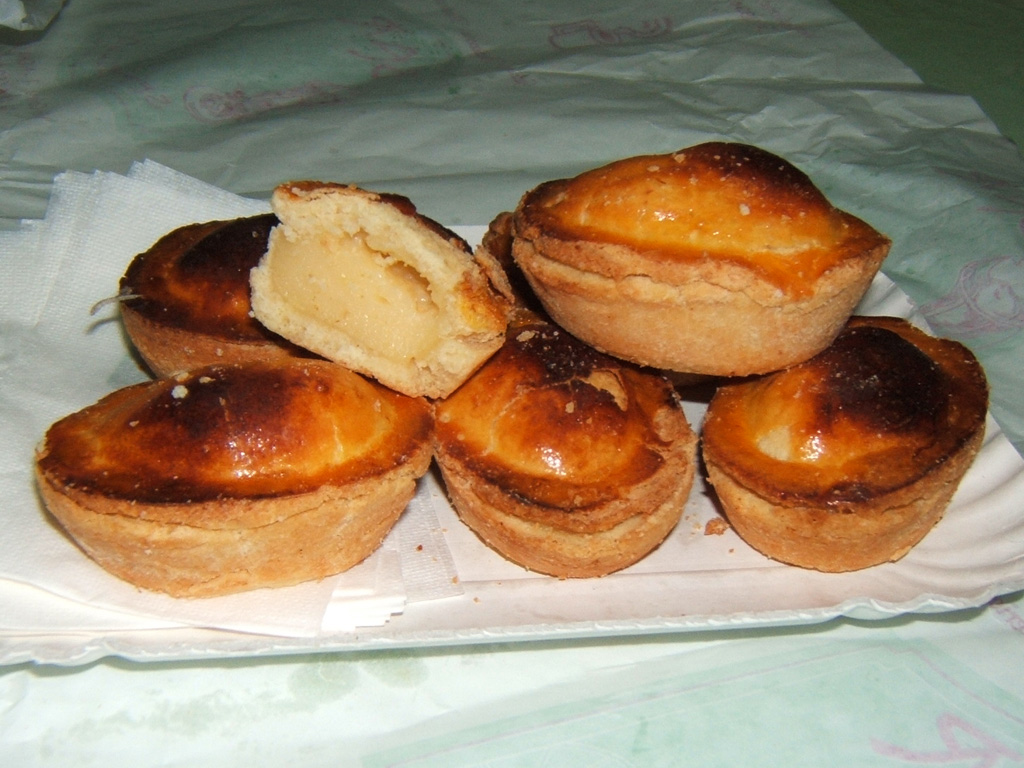 pasticciotto mignon di Galatina